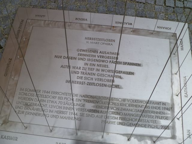 Denkmal der Künstlerin Bibiana Weber - Bodenplatte